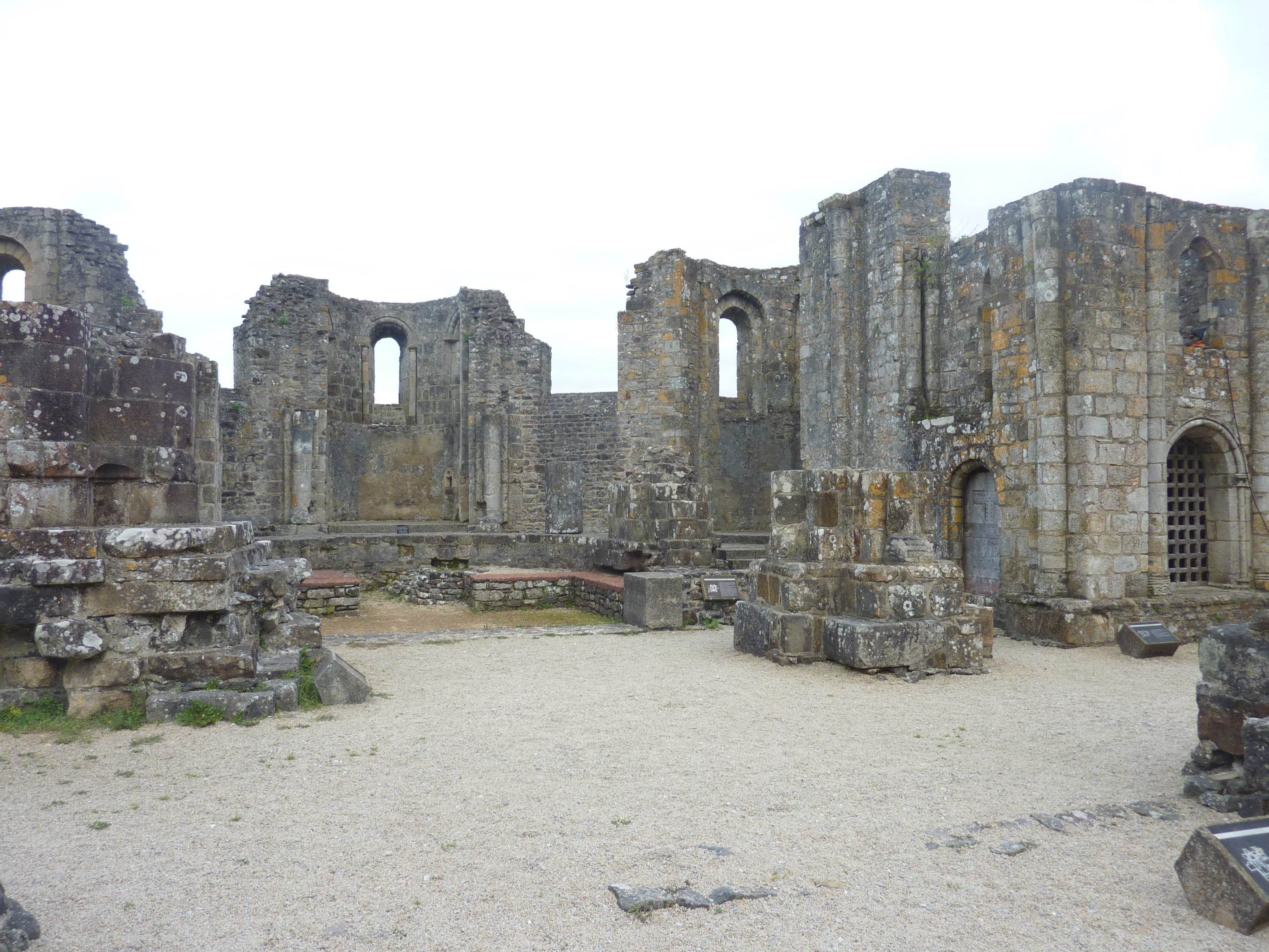 Abbaye de Landévennec : les ruines de l'égise abbatiale carolingienne